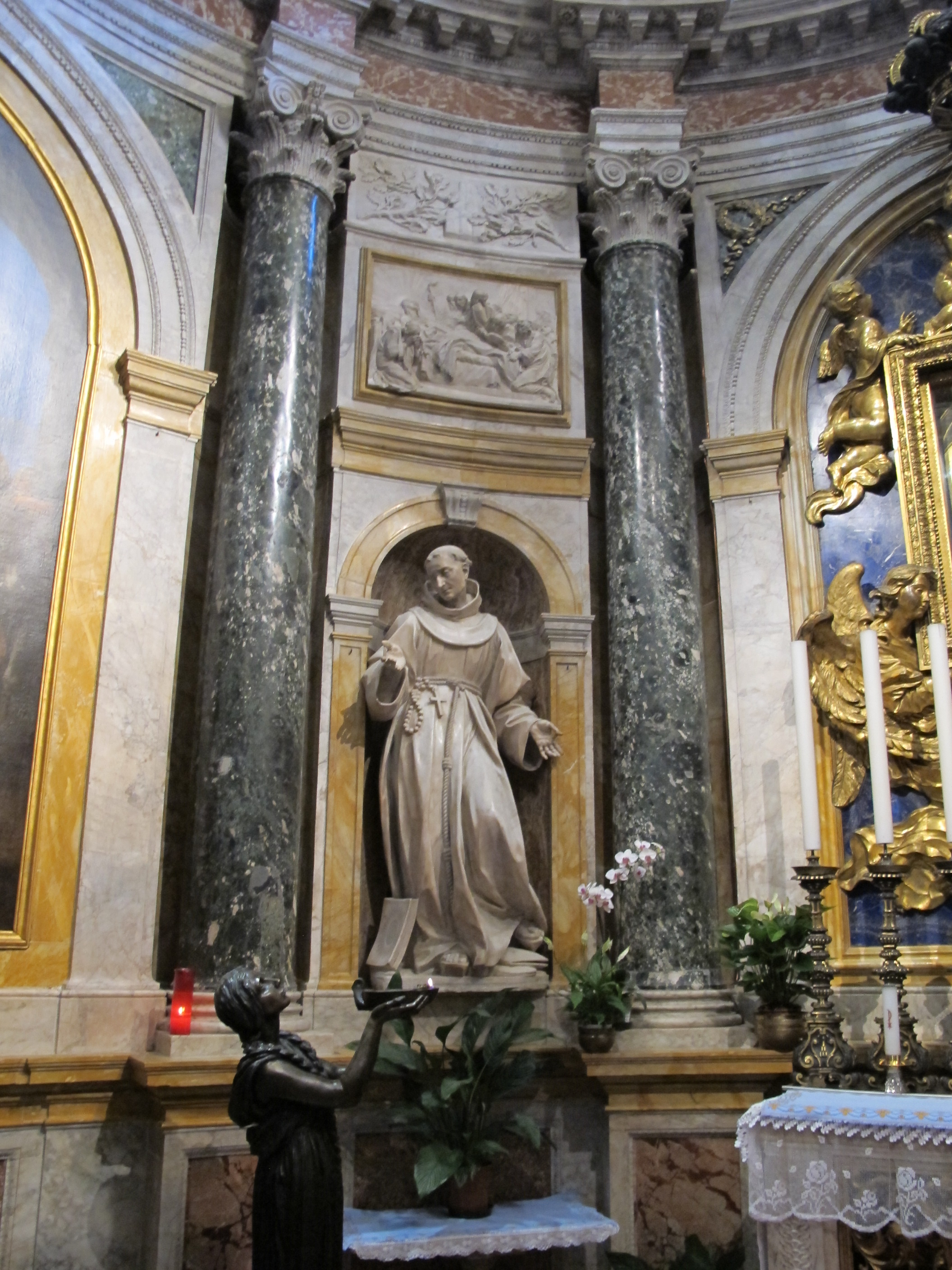 Cappella chigi (siena), antonio raggi, San Bernardino